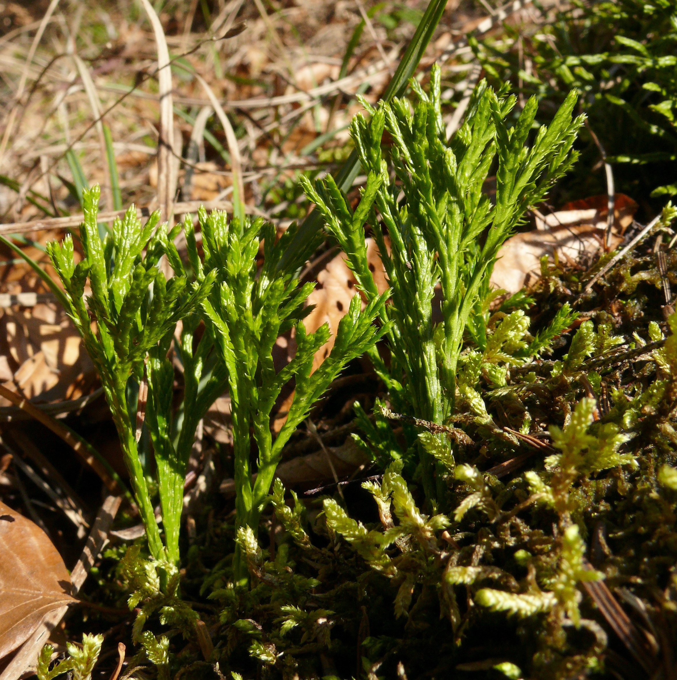 Diphasiastrum complanatum, Schwäbisch-Fränkische Waldberge, Germany